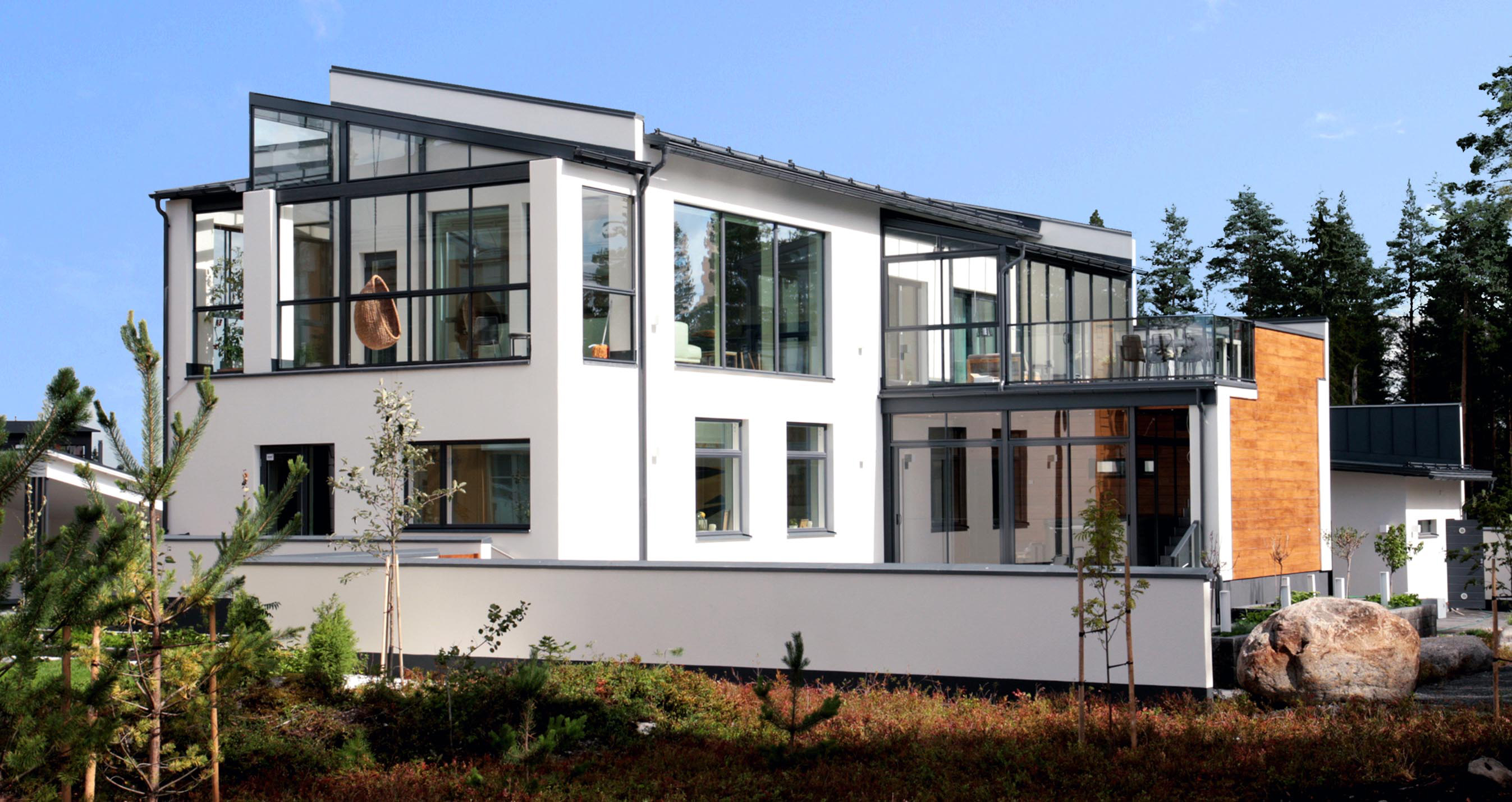 Seinäjoen asuntomessut 2016